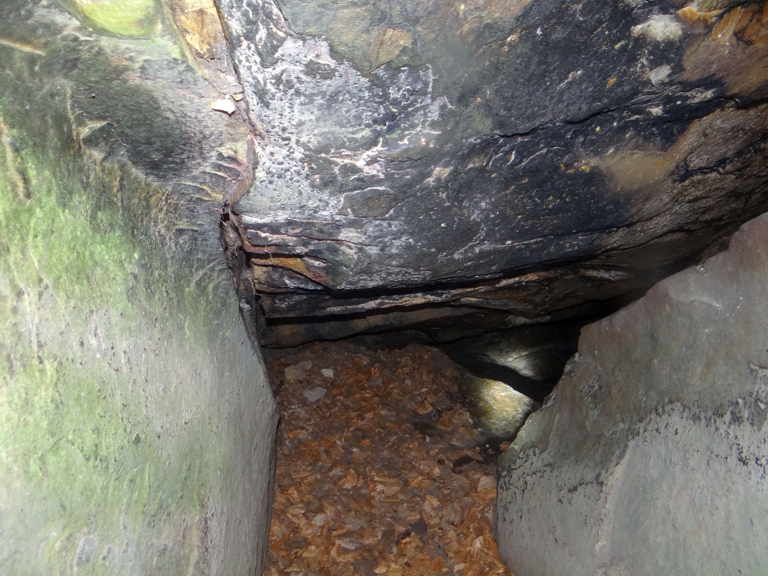 Diabla Dziura w Bukowcu